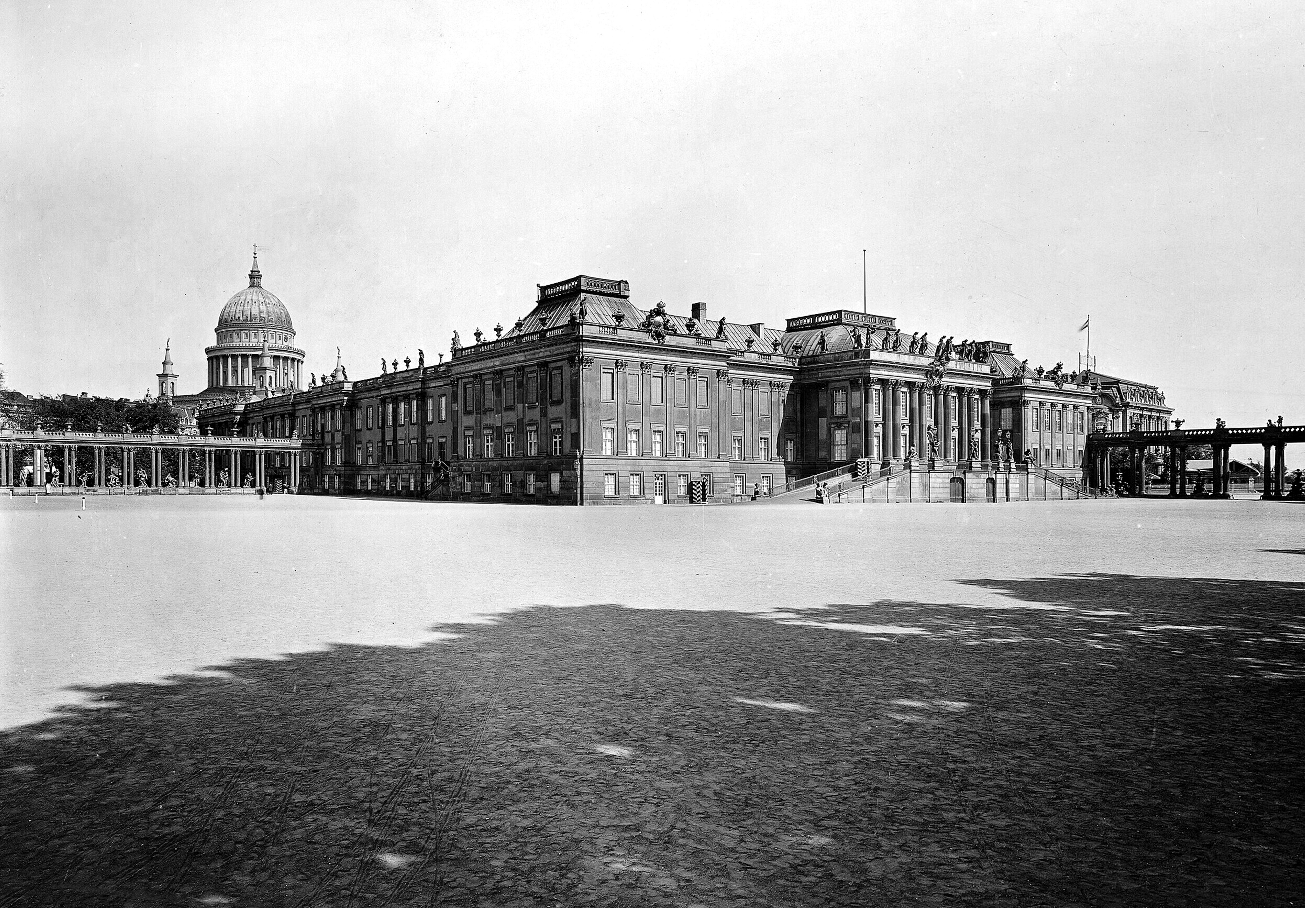 Stadtschloss Potsdam, Gesamtansicht